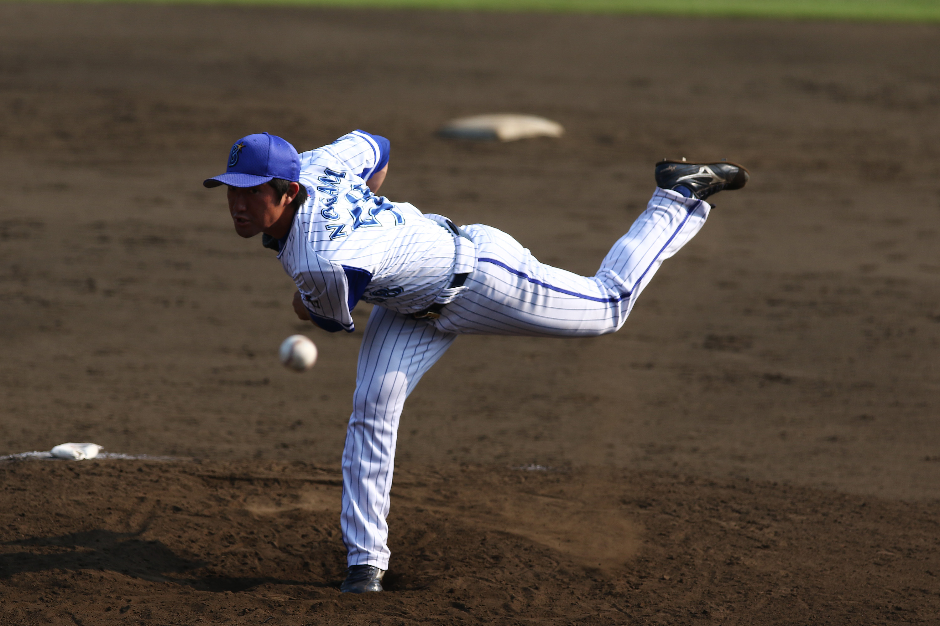 横浜DeNAベイスターズの野川拓斗